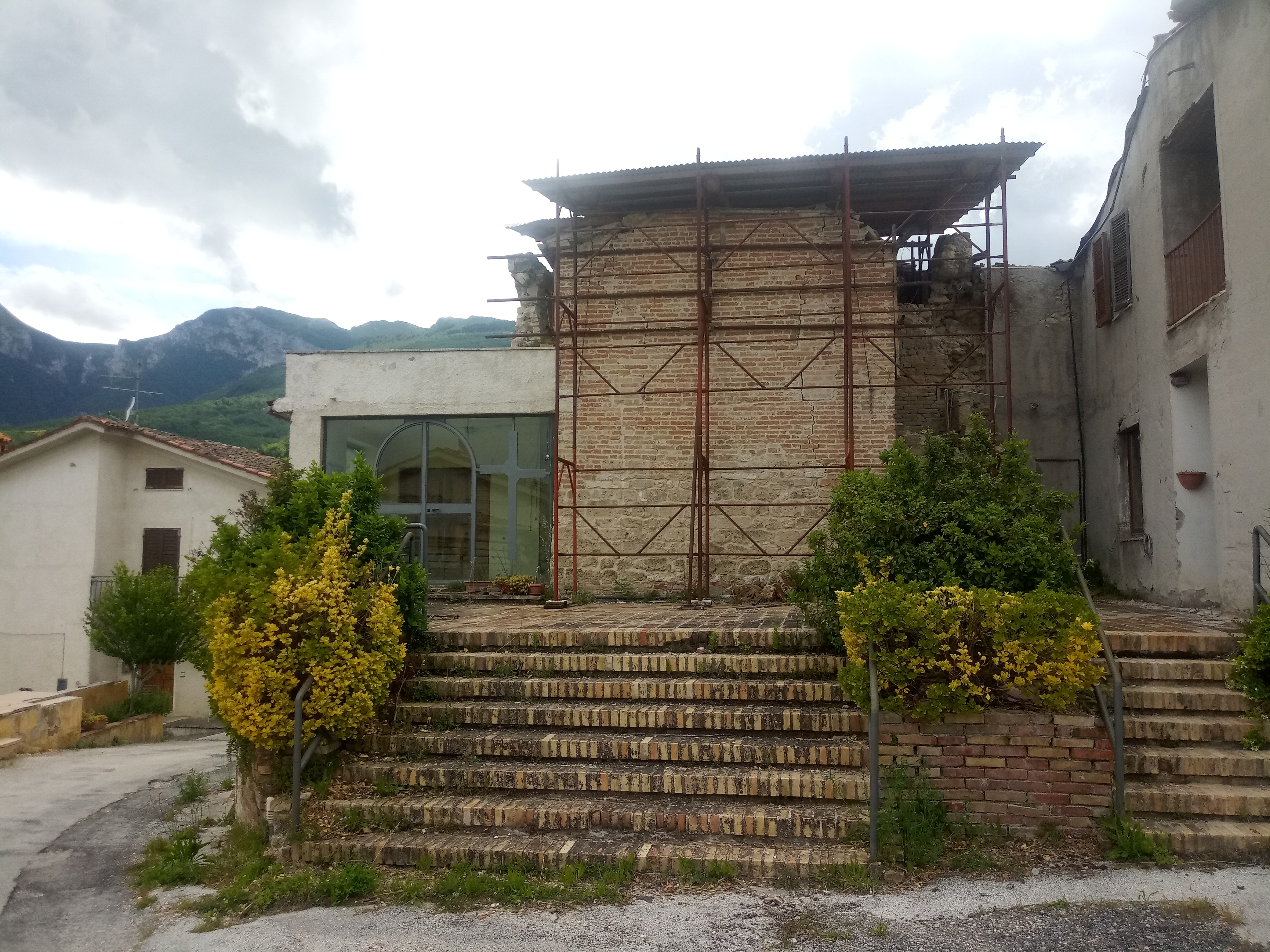 Chiesa di San Cassiano, demolita perché inagibile